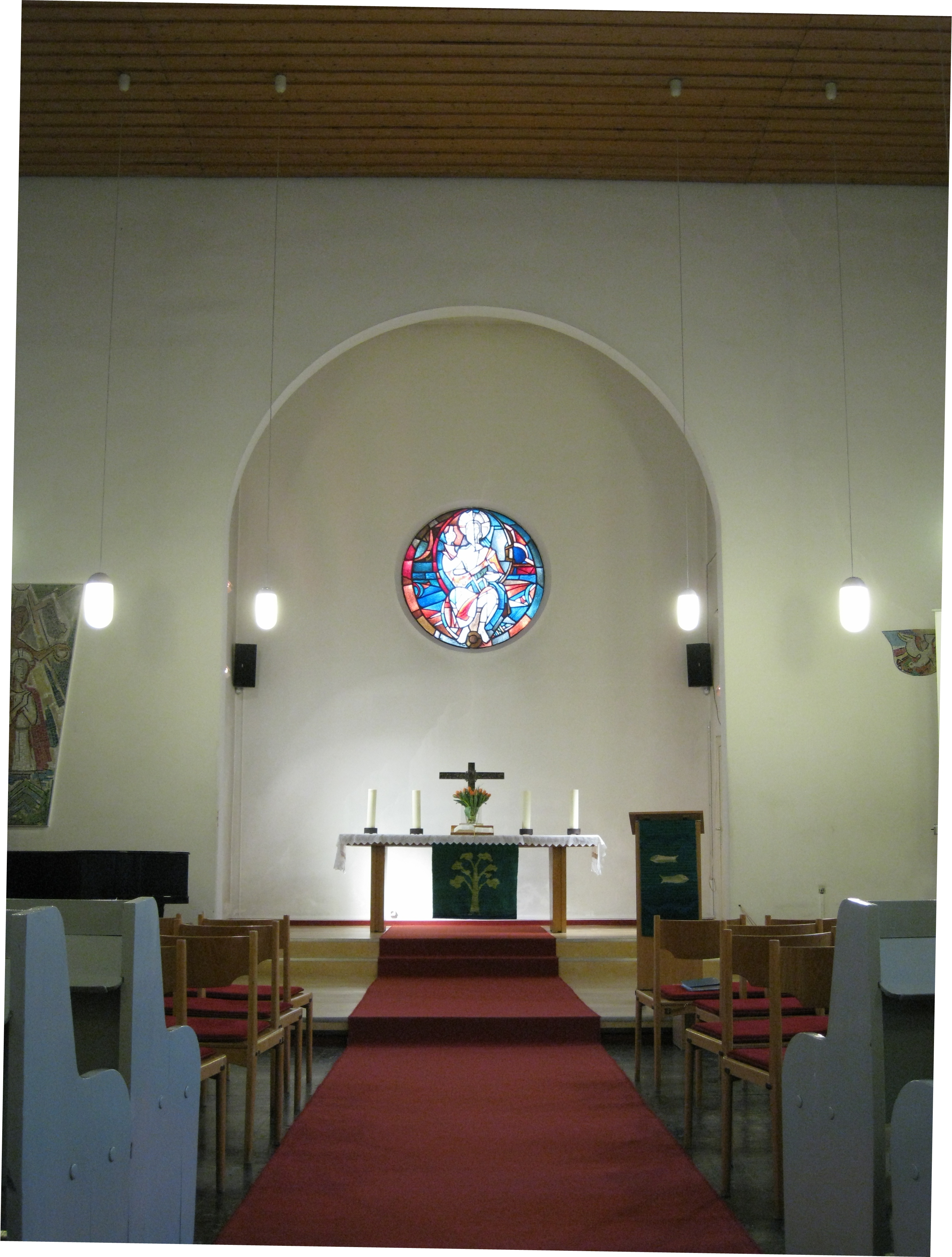 Innenraum der Kirche, von der Straße durch die geöffnete Tür fotografiert